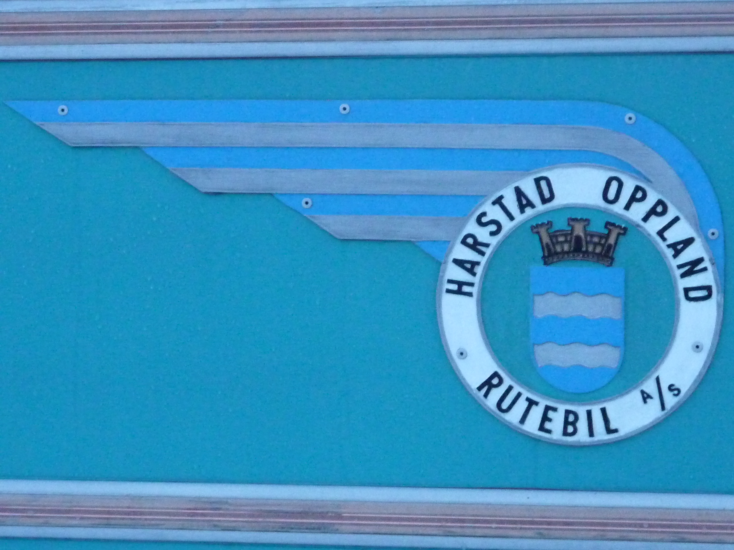 HORB logo